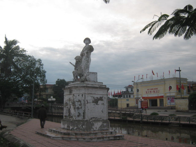 Đài tưởng niệm chiến sỹ cách mạng thị trấn Phát Diệm, Kim Sơn